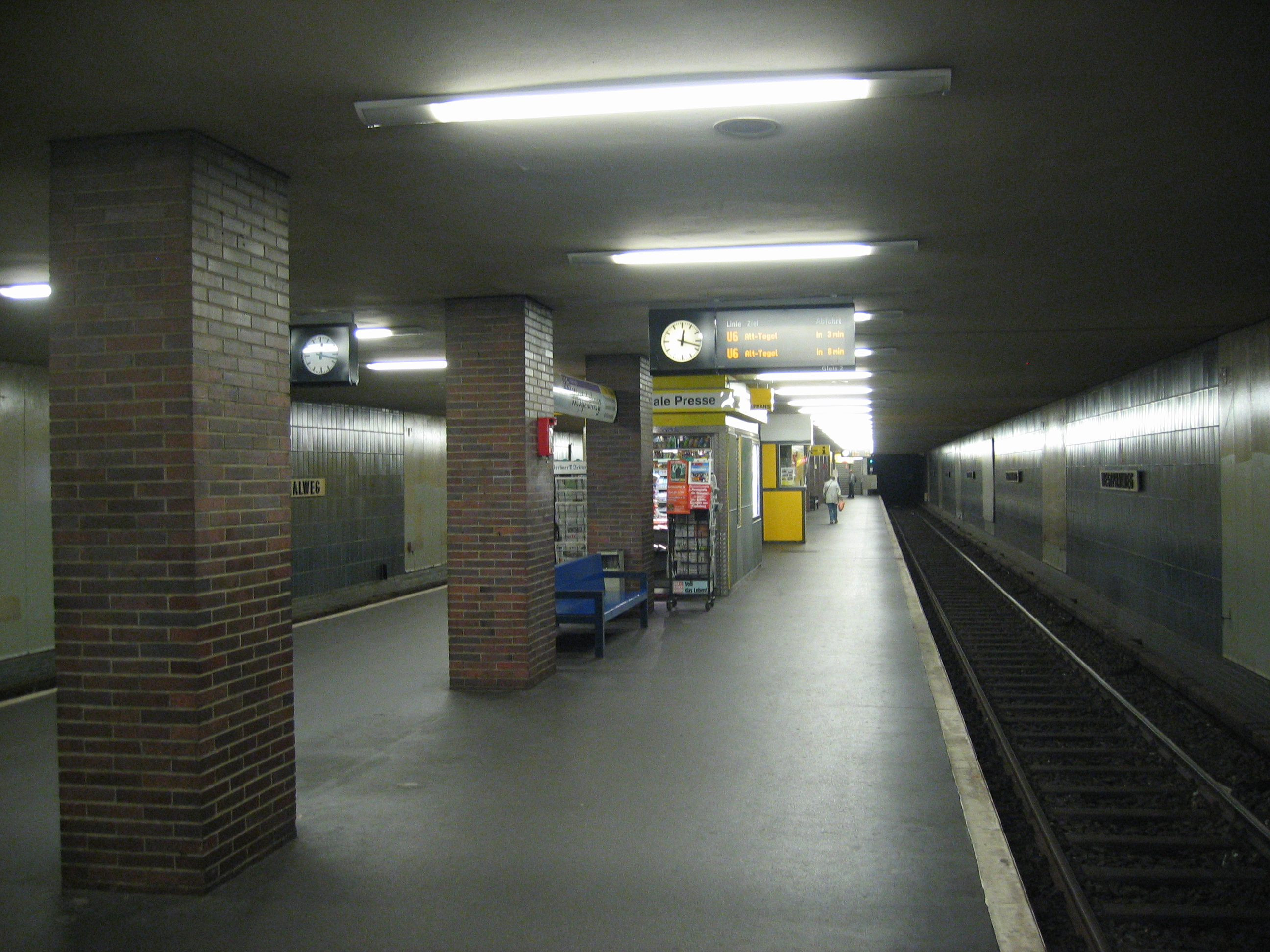 U-Bahnhof Westphalweg, Berlin